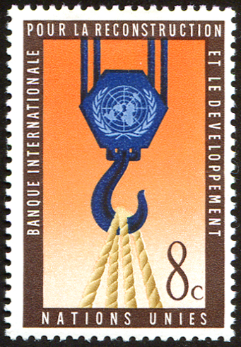 Беларуская (тарашкевіца): Марка ААН «Міжнародны банк рэканструкцыі і разьвіцьця»